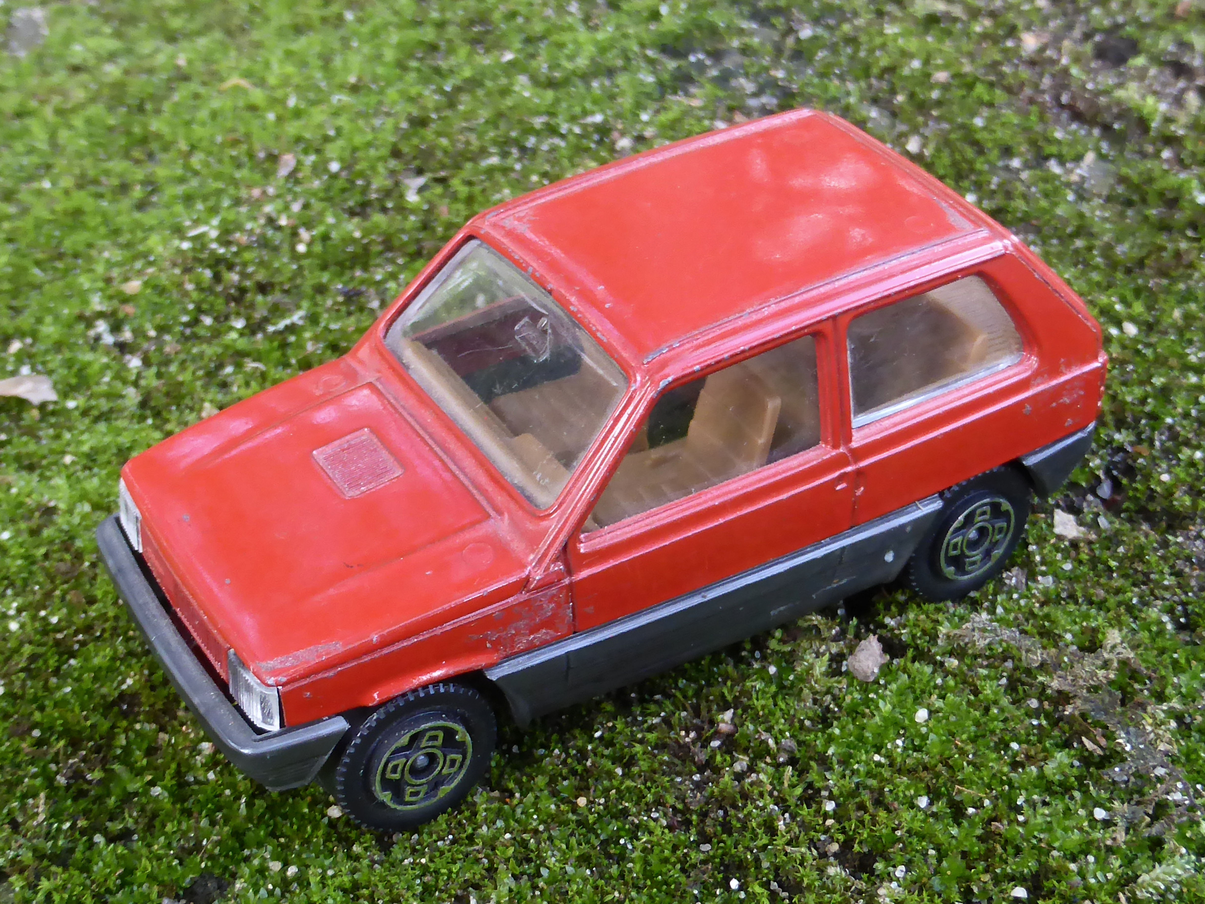 Modellauto "FIAT Panda 45" von Bburago im Maßstab 1:43.